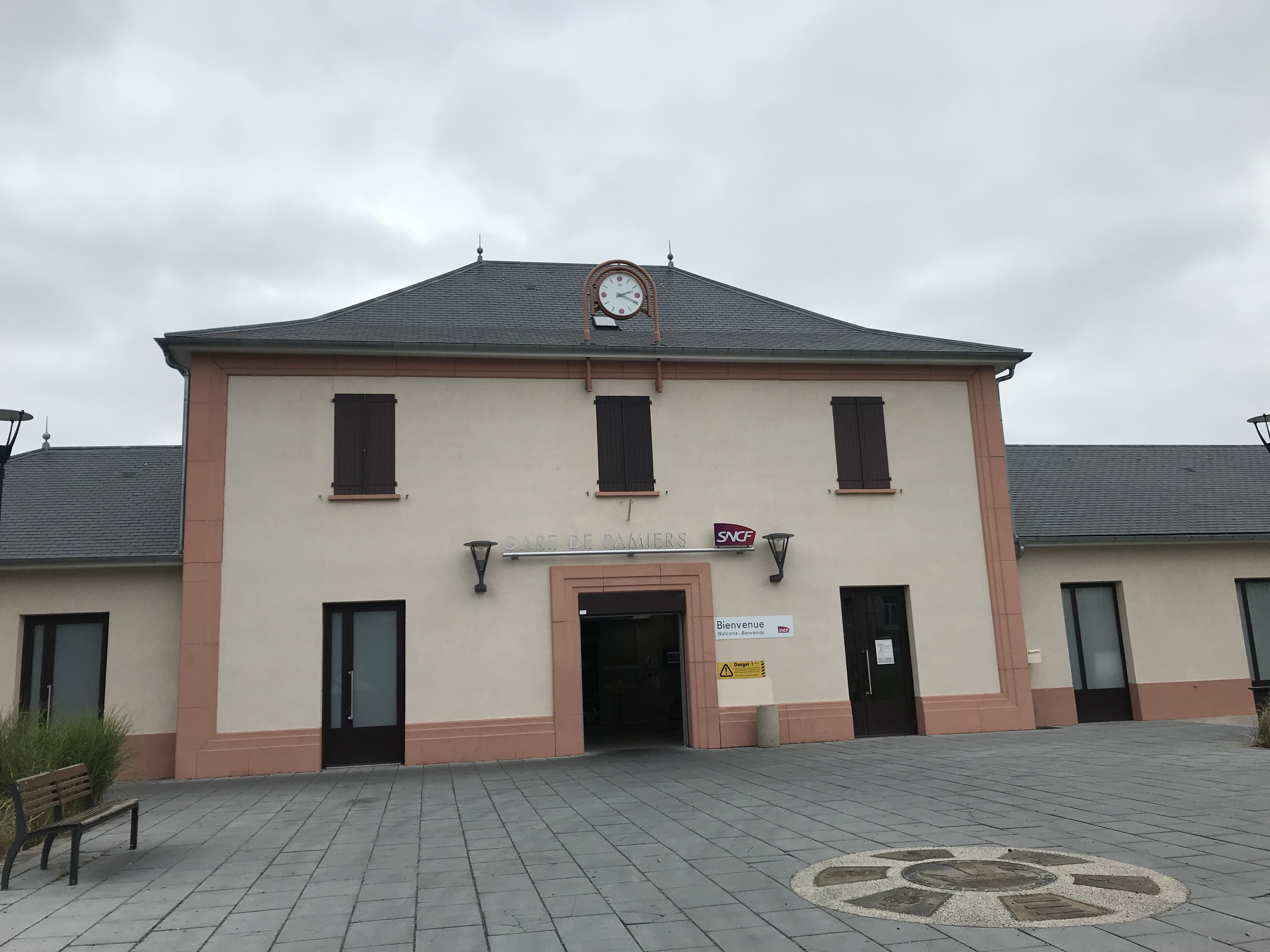 Gare de Pamiers